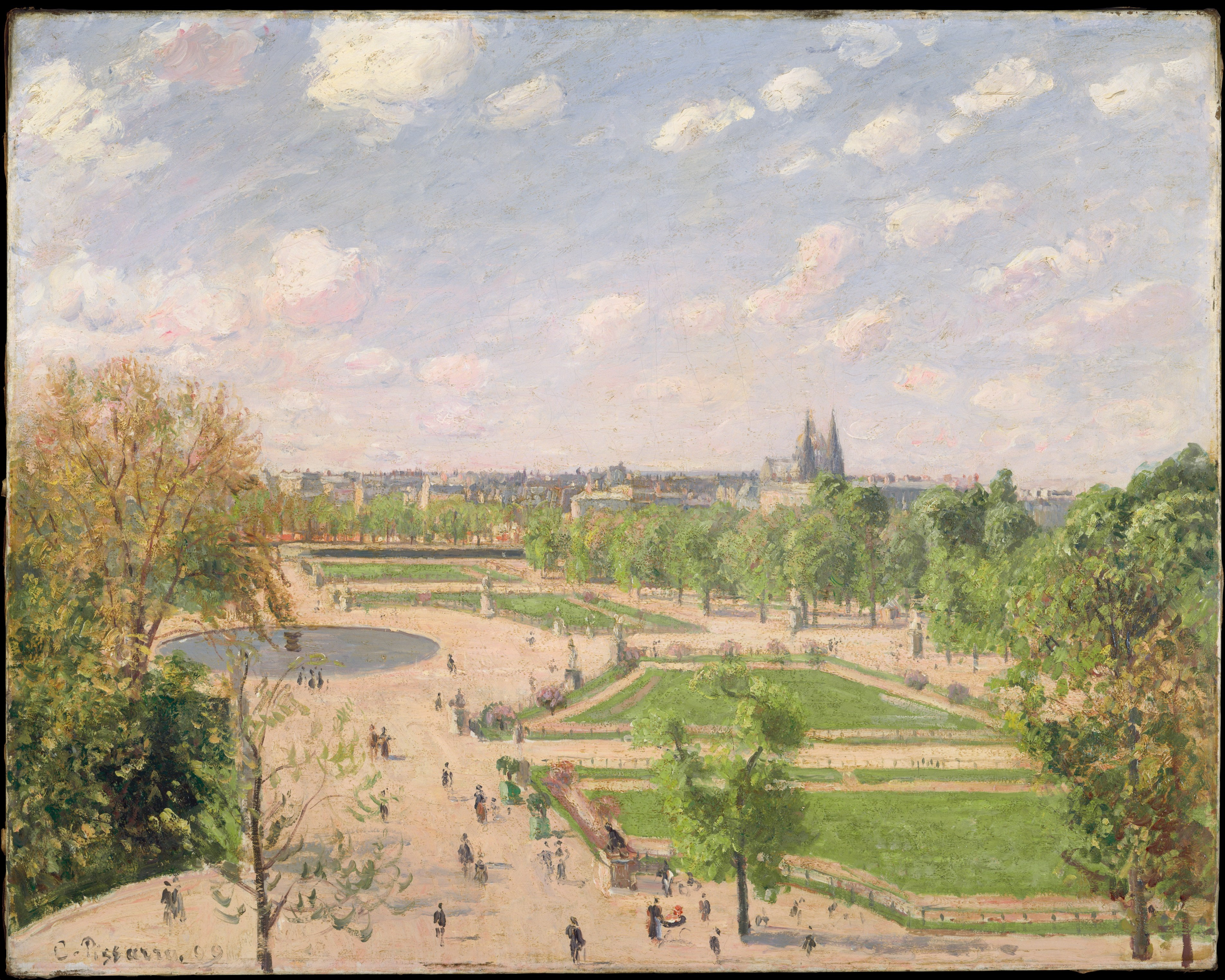 Pissarro festménye a New York-i Metropolitan Múzeumban Wikipedia Loves Art at the Metropolitan Museum of Art This photo of item # 1992.103.3 at the Metropolitan Museum of Art was contributed under the team name "trish" as part of the Wikipedia Loves Art project in February 2009. Metropolitan Museum of Art The original photograph on Flickr was taken by Trish Mayo—please add a comment to the original Flickr page whenever a use has been made on Wikipedia or another project. Project galleries on Flickr: this institution, this team